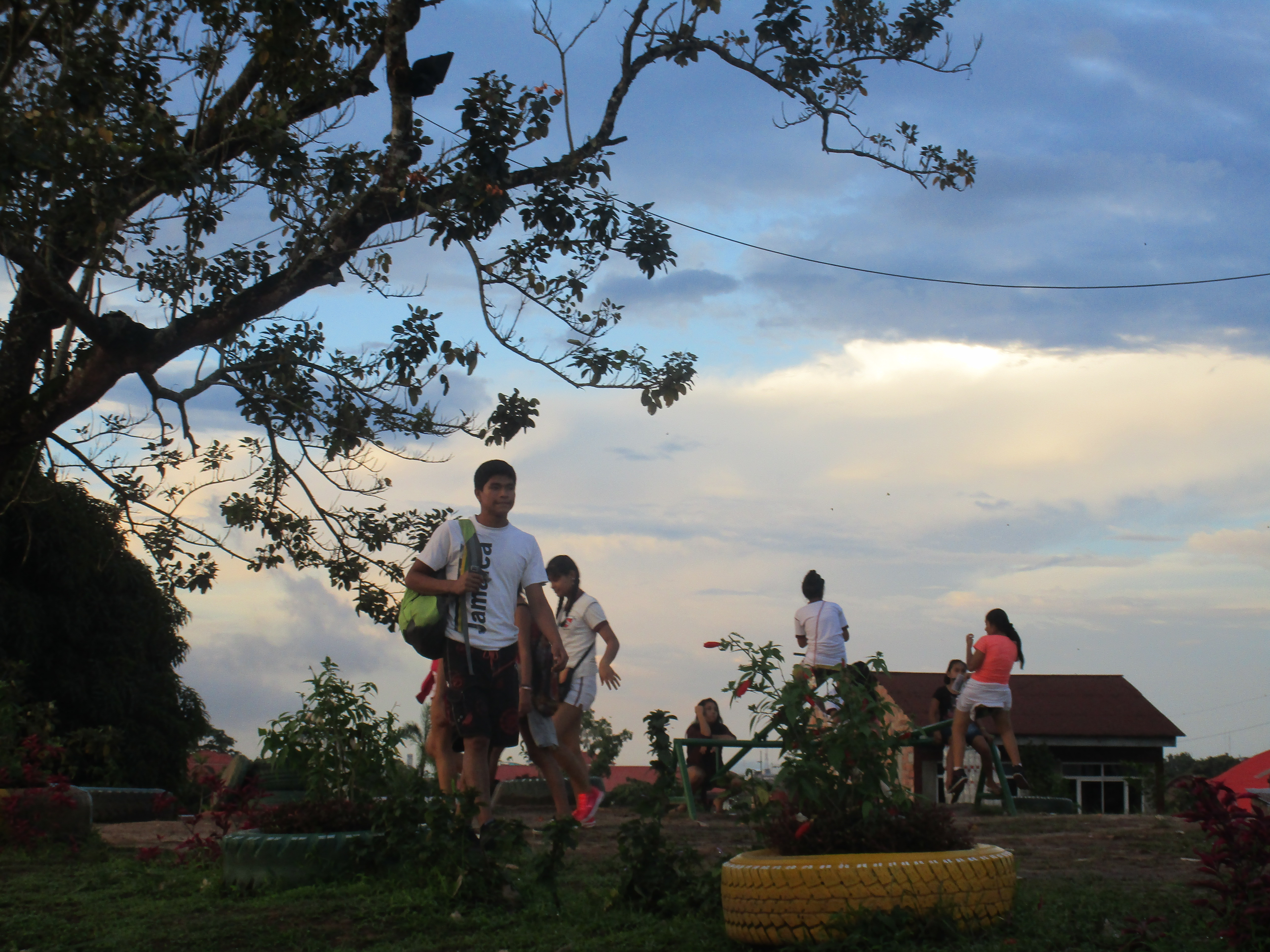 Parque Tematico de Maynas